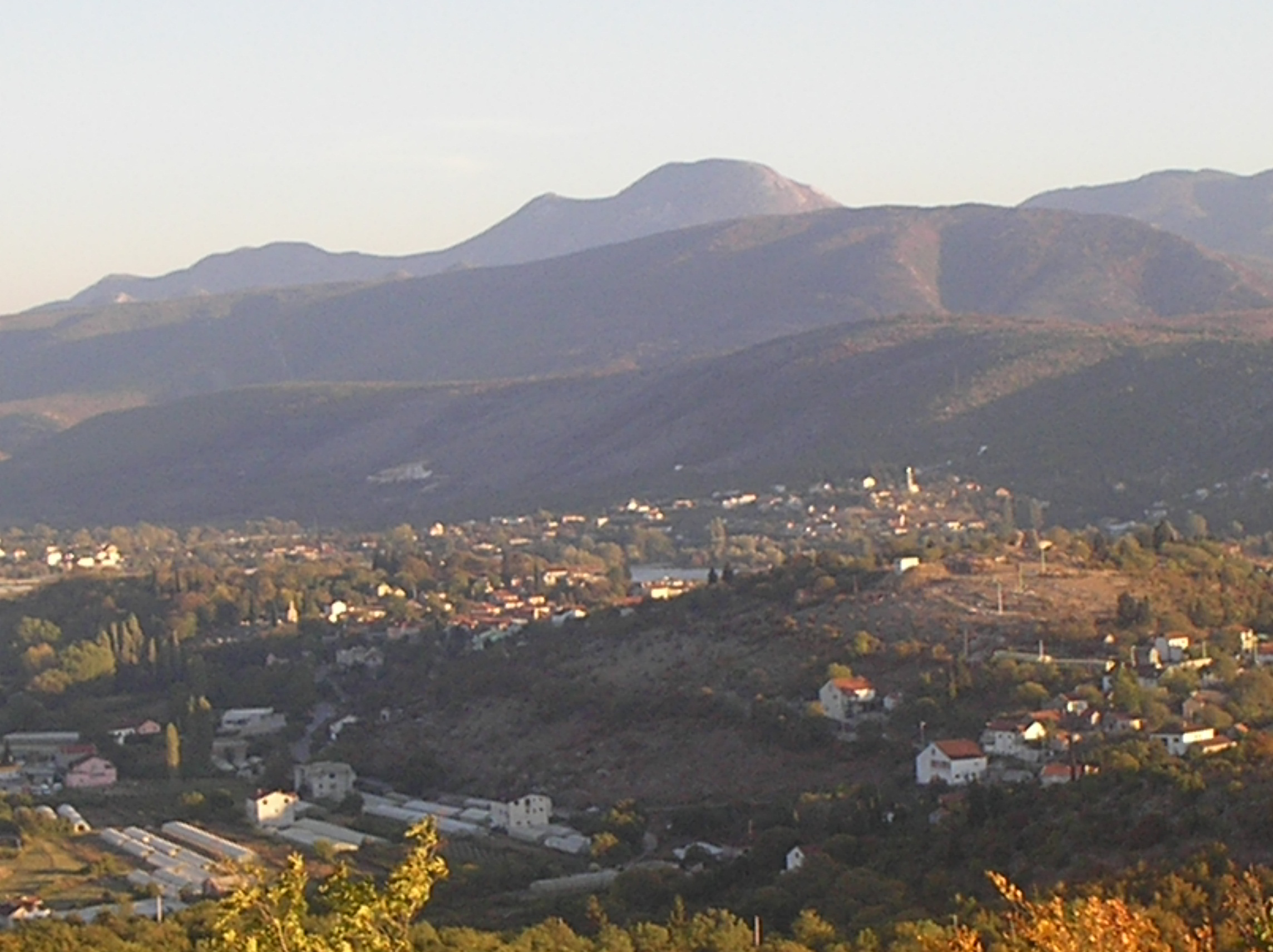 sjevero-zapad